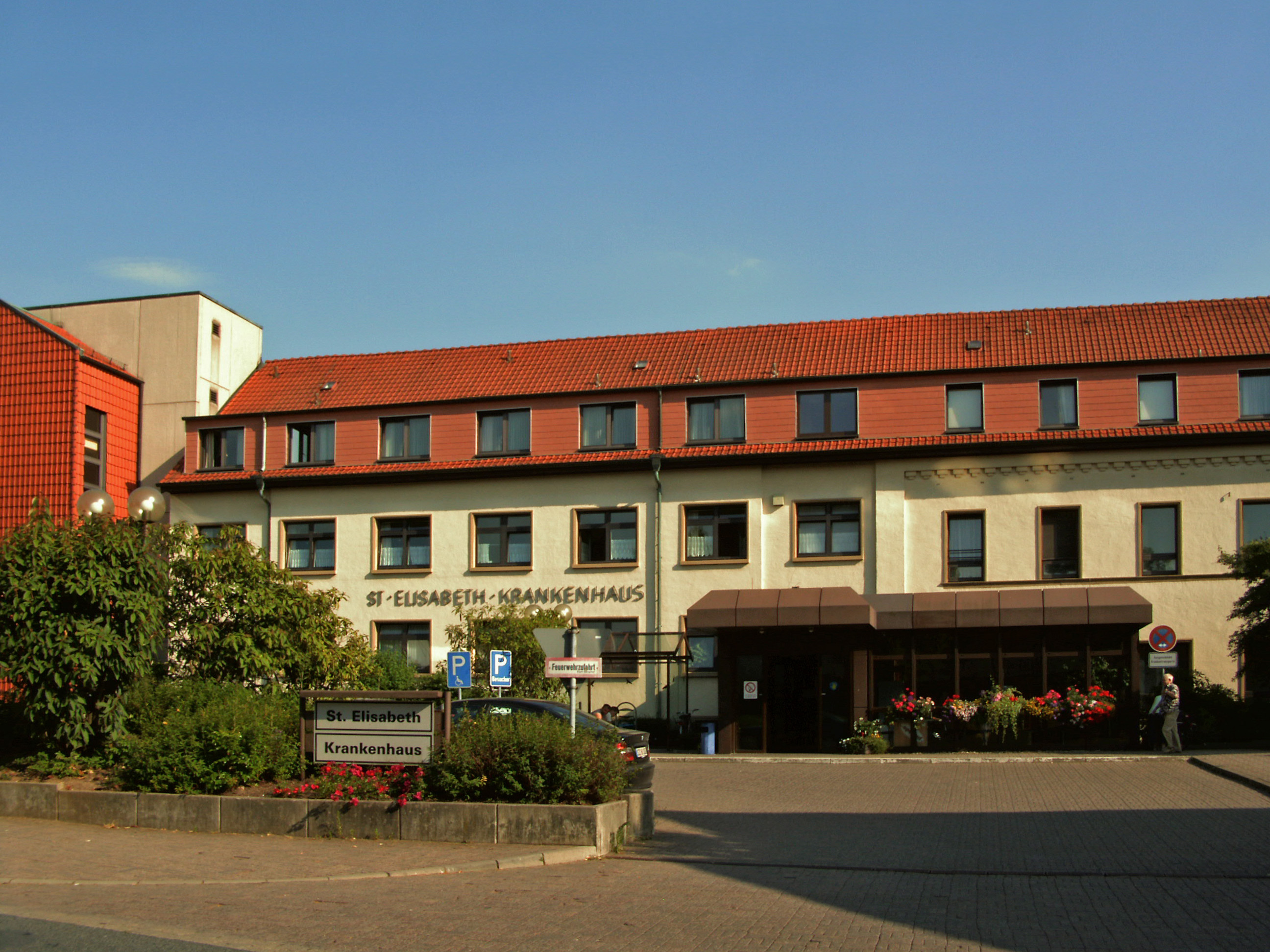 Katholisches Krankenhaus St. Elisabeth in Salzgitter-Bad, Eingangsseite